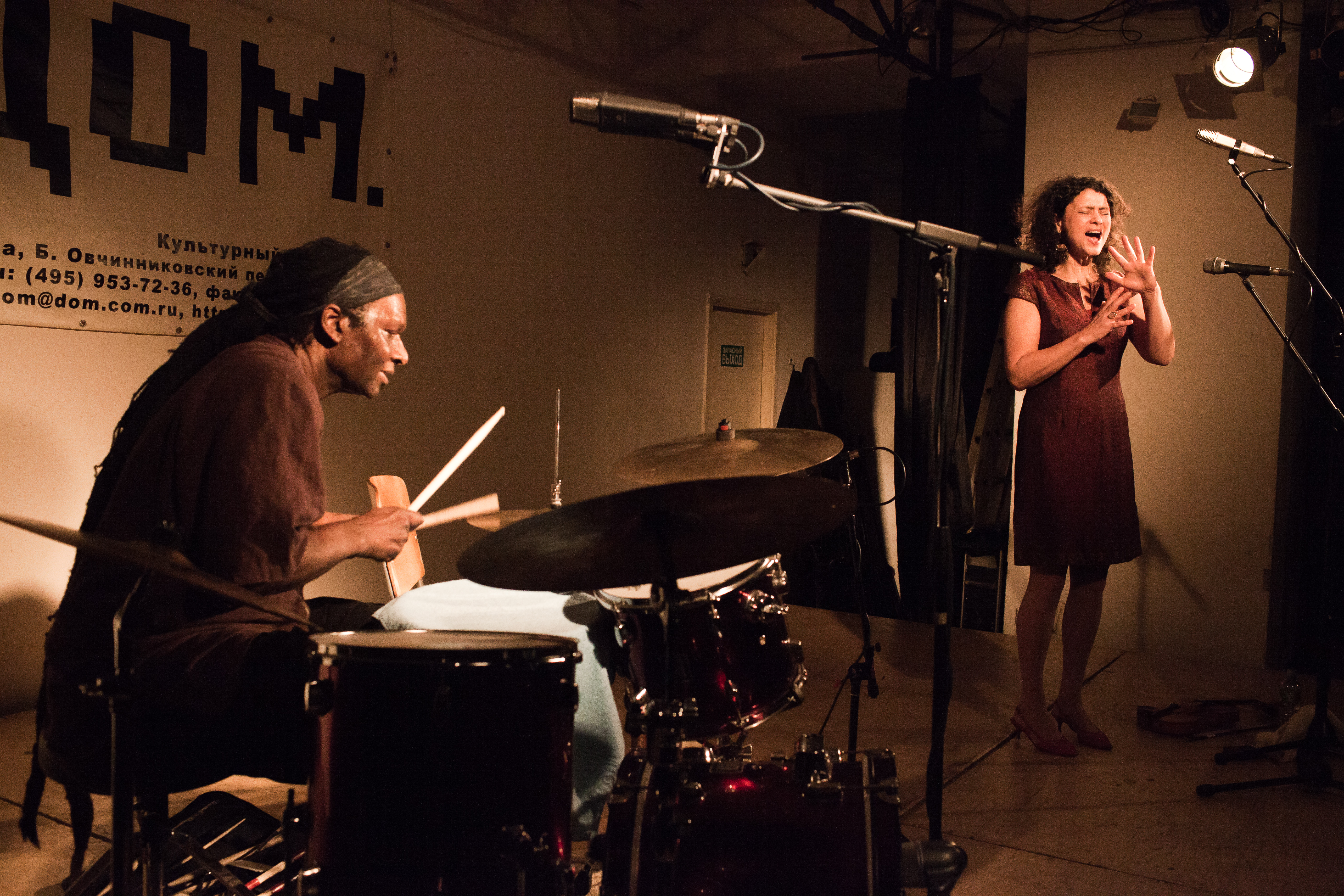 Иван Биттова и Хамид Дрейк в клубе "Дом" (Москва)